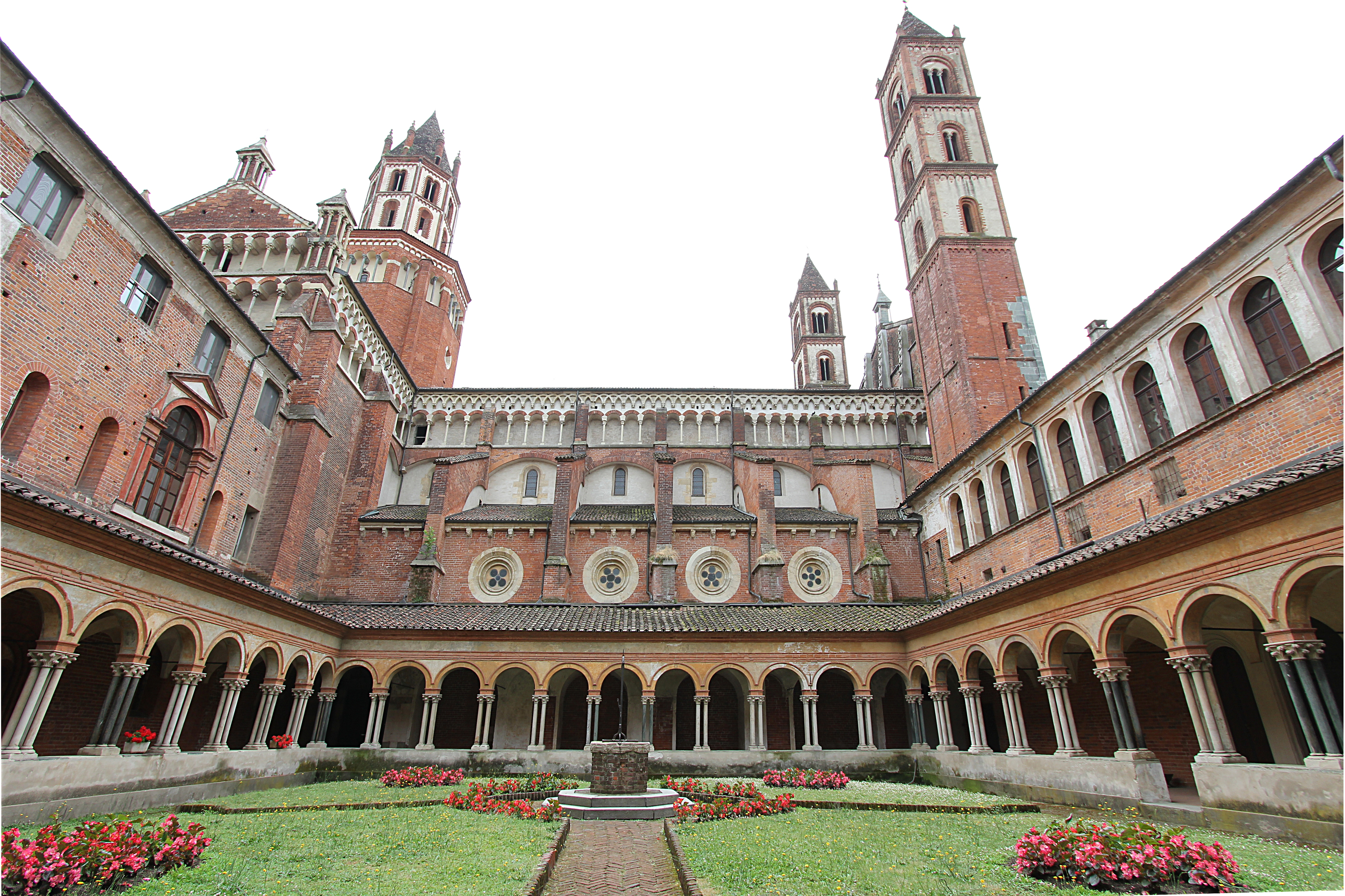 Chiostro di S. Andrea This is a photo of a monument which is part of cultural heritage of Italy.